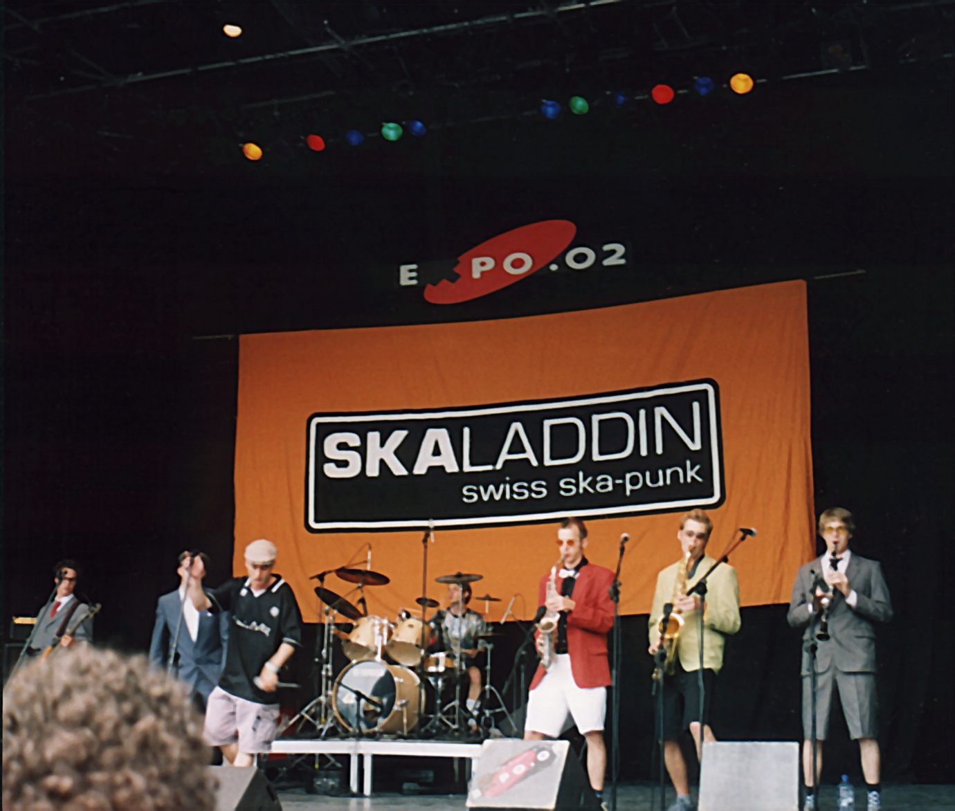 Skaladdin-Konzert auf der Arteplage Biel der Expo.02 (Schweiz)